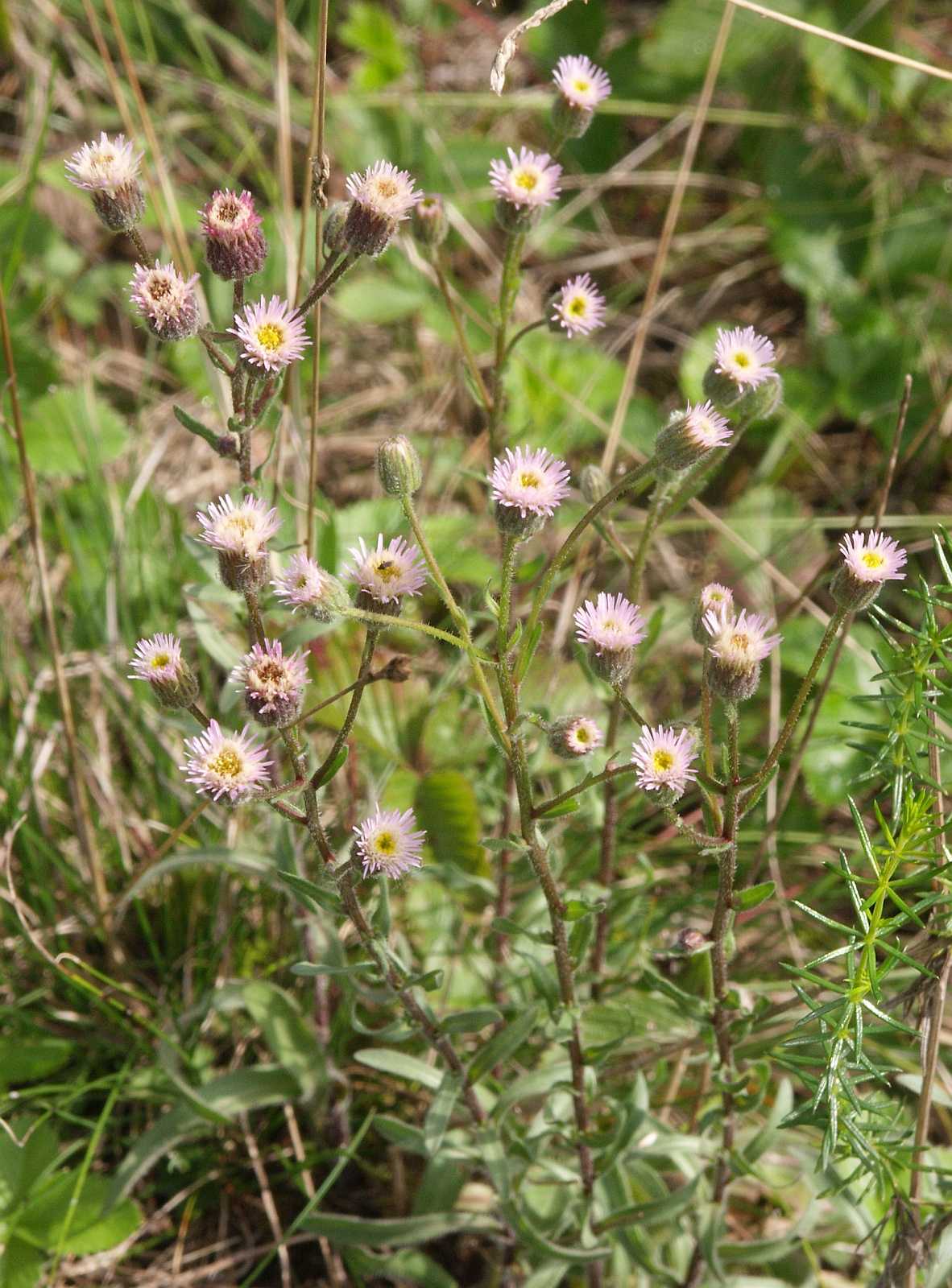 Erigeron acris, Frankenhöhe, Germany